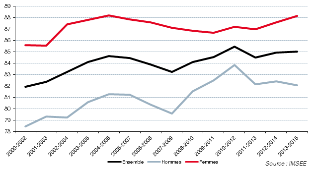 Средняя продолжительность жизни в Монако